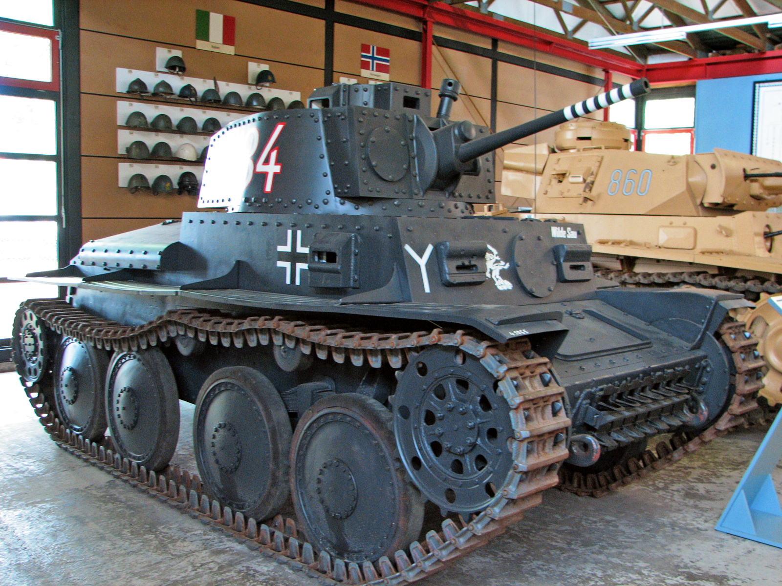 Dieses Bild zeigt einen Panzer 38 (t) Ausf. S.